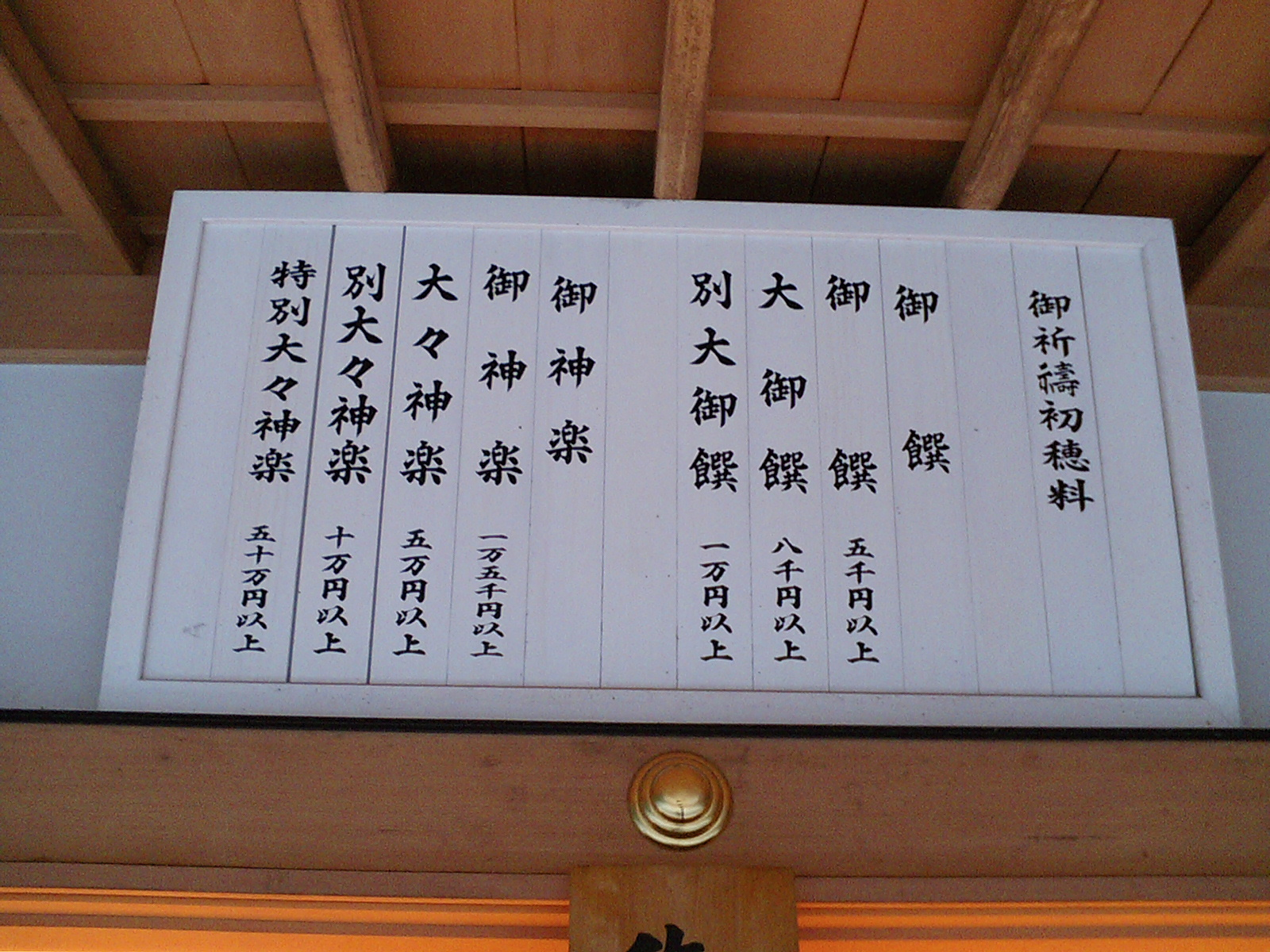 豊受大神宮(外宮) 神札授与所の御祈祷初穂料看板。2005年11月16日に三重県伊勢市で基建吉が撮影した。